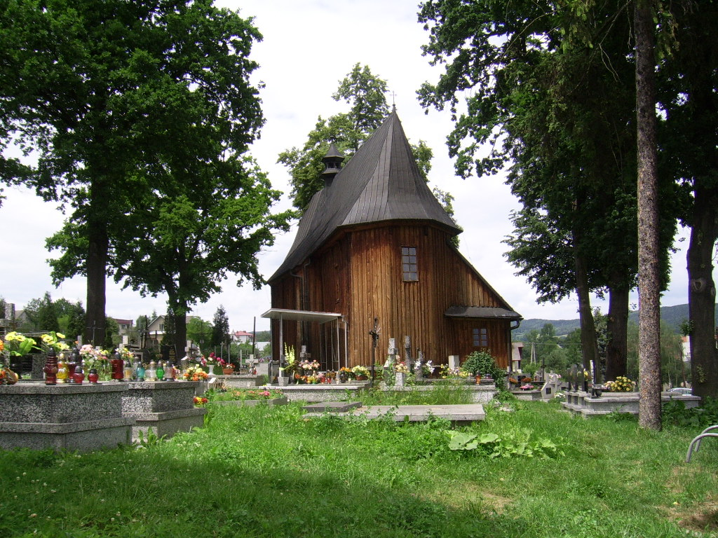 Iwkowa - Kościół cmentarny Nawiedzenia Najświętszej Marii Panny